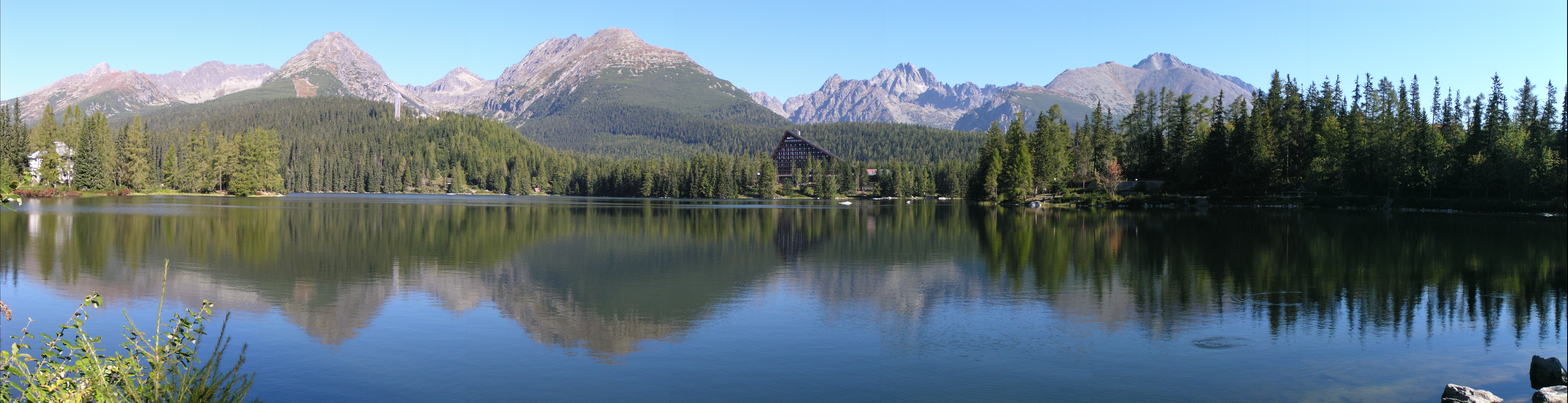 Panoramaansicht von Štrbské Pleso (Tschirmer See) mit Blick auf die Hohe Tatra